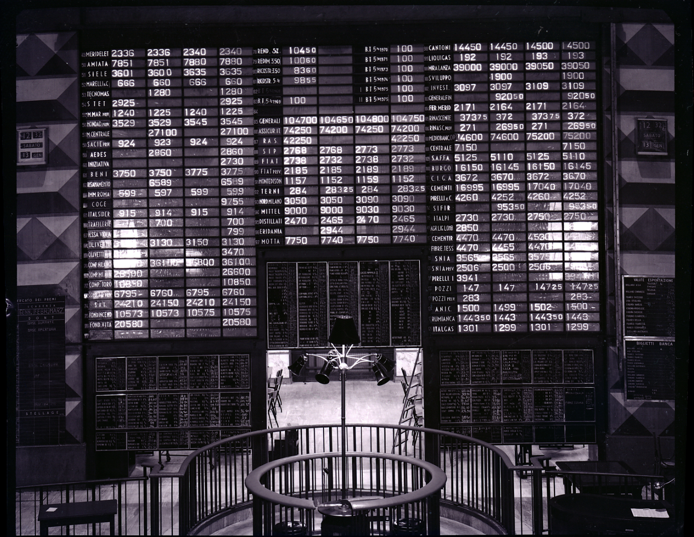 Servizio fotografico : Milano, 1968 / Paolo Monti. - Buste: 6, Fototipi: 6 : Negativo b/n, gelatina bromuro d'argento/ pellicola ; 10x12. - ((Serie costituita da 15 negativi identificati con i nn.: 14819-14827. La suddetta serie è contenuta nella scatola identificata con la numerazione G14501-15000. - Fonte: Agenda di Paolo Monti: Monti/ 3 aprile 1966 - 9 marzo 1971/ 12421-16823 (1966-1971), presso Archivio Paolo Monti